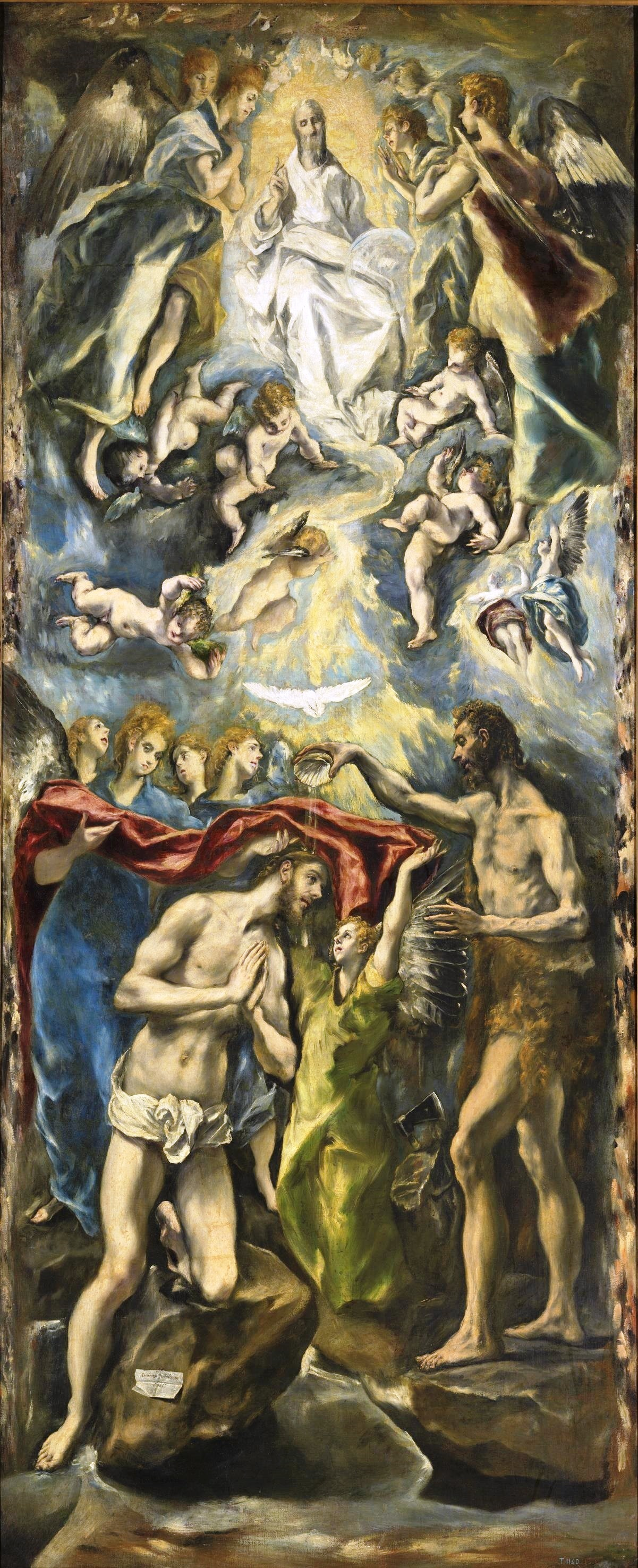 La obra representa el momento en que Jesucristo fue bautizado por el profeta San Juan Bautista.